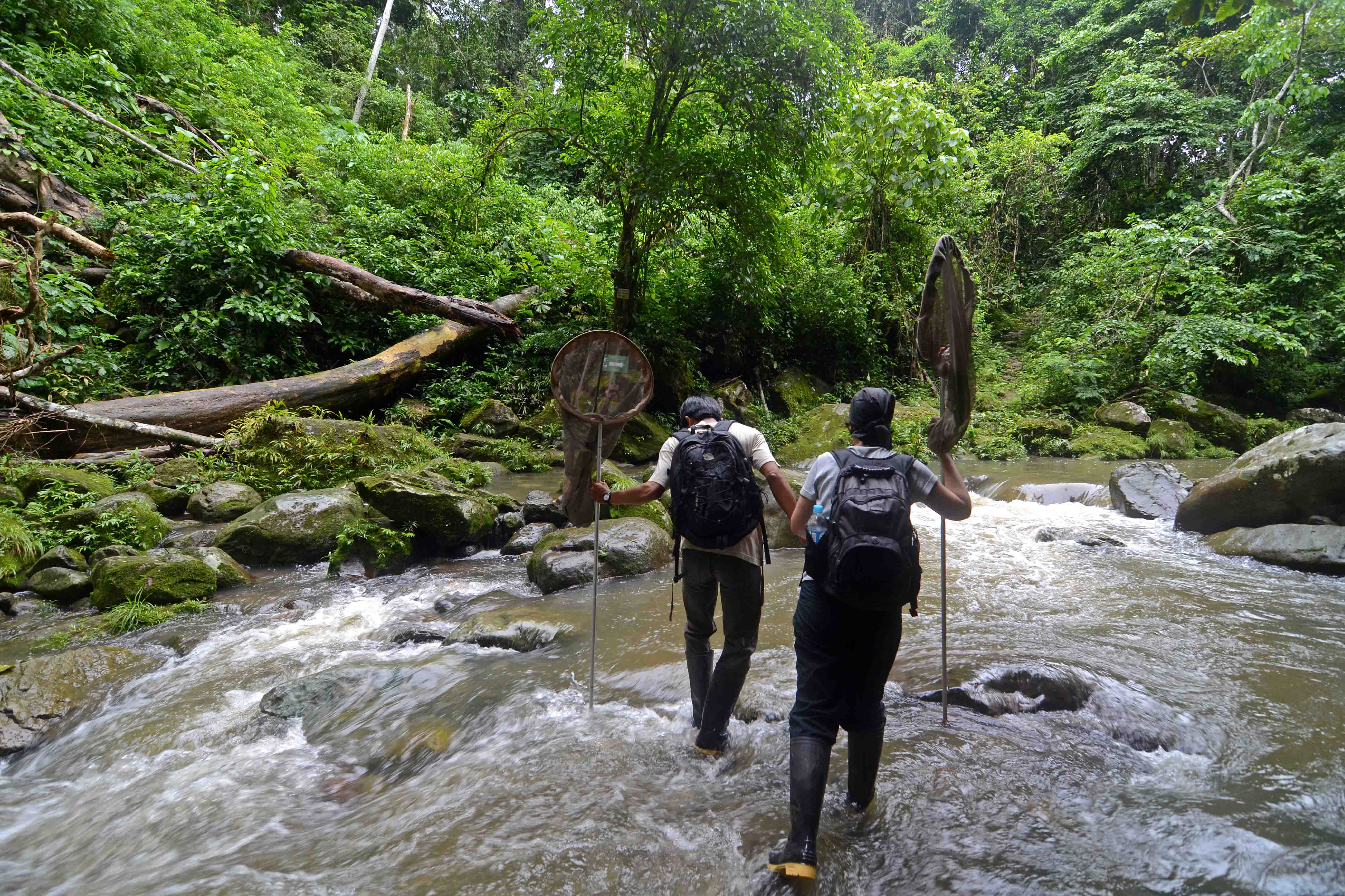 nr. Moyobamba, Peru